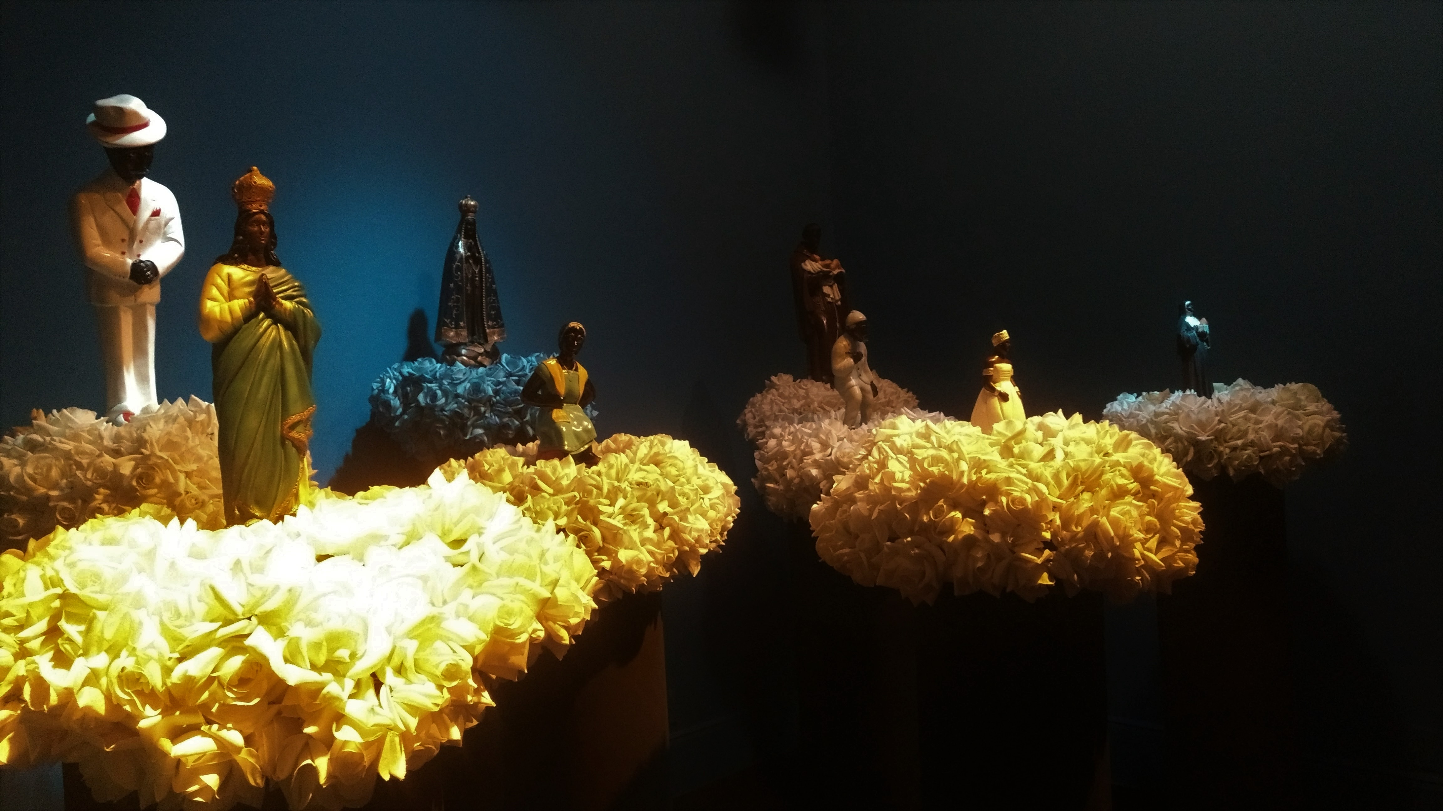 Santos de diversas religiões, localizados na Sala "Santos da Fé", no interior da casa um do Museu do Folclore de São José dos Campos, Brasil.